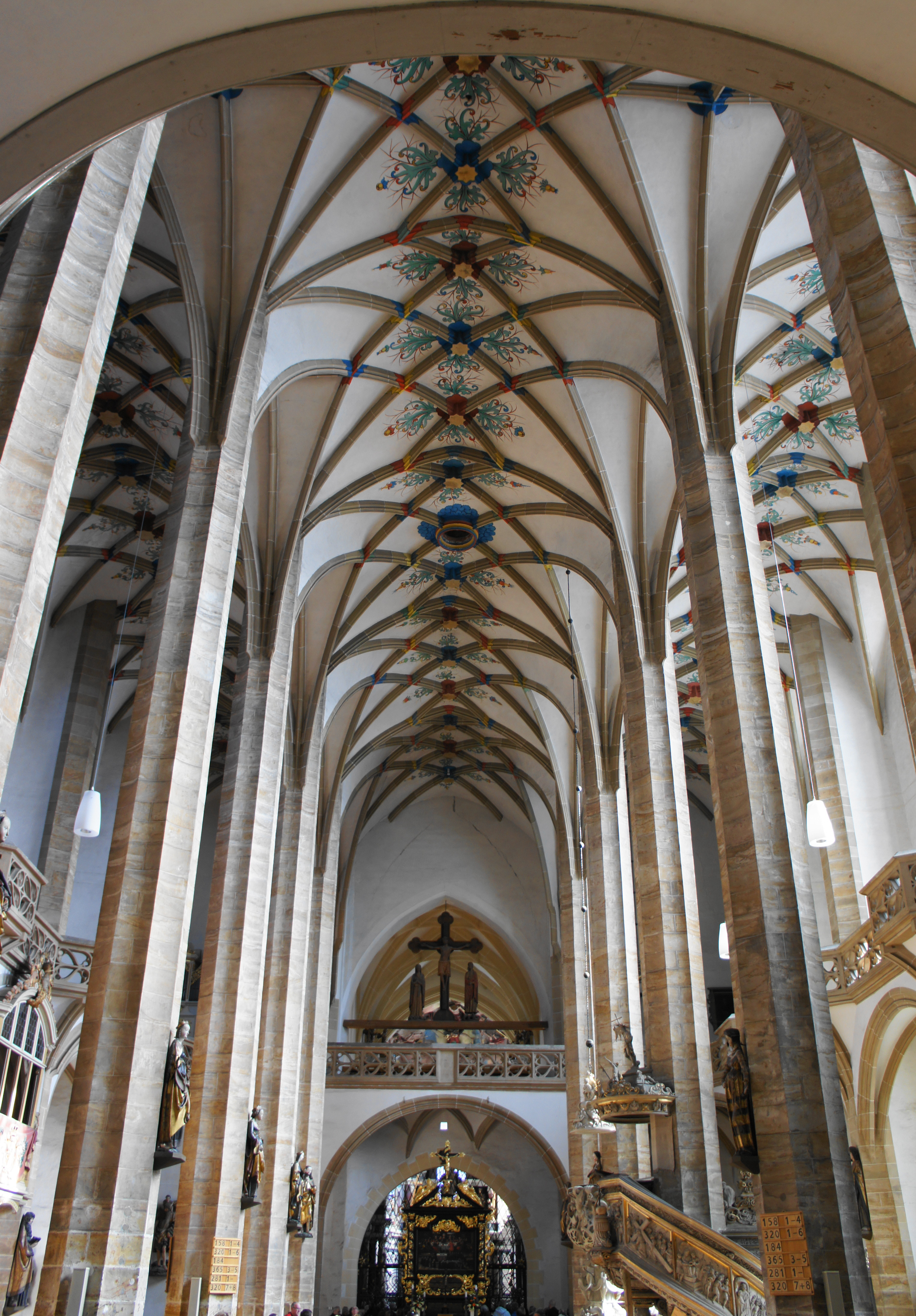 Der Dom zu Freiberg